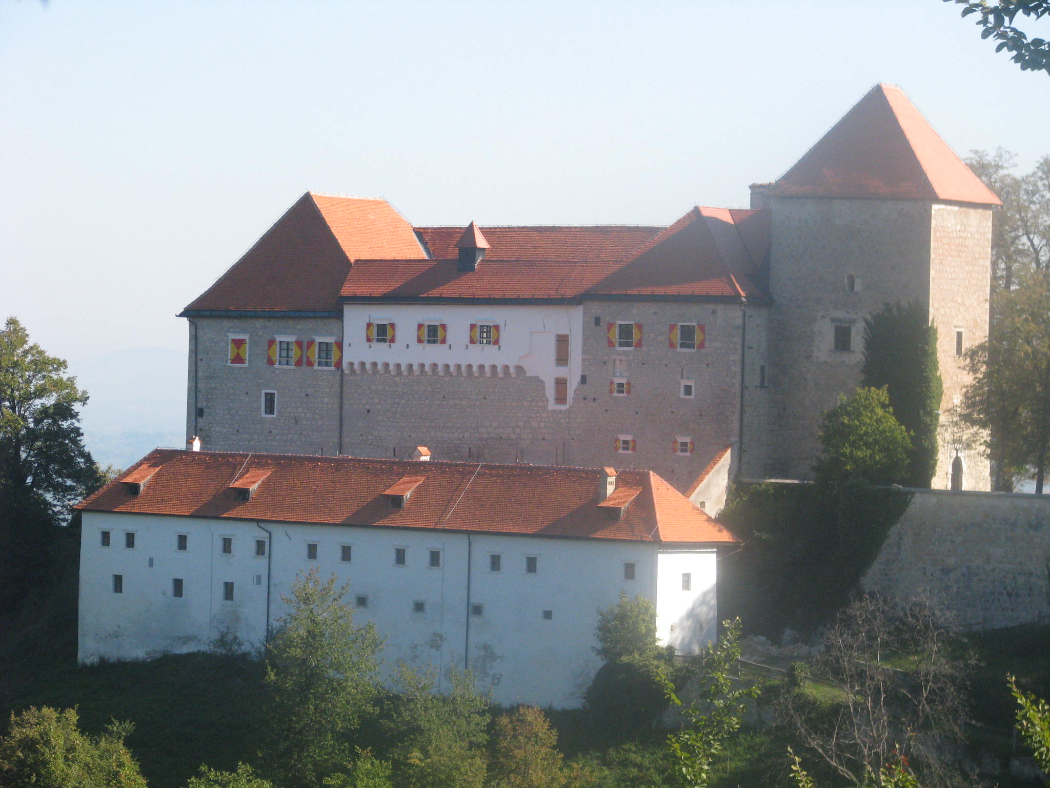 Castle Podstreda